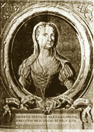 Lorenzo_di_ferdinando_de'_medici